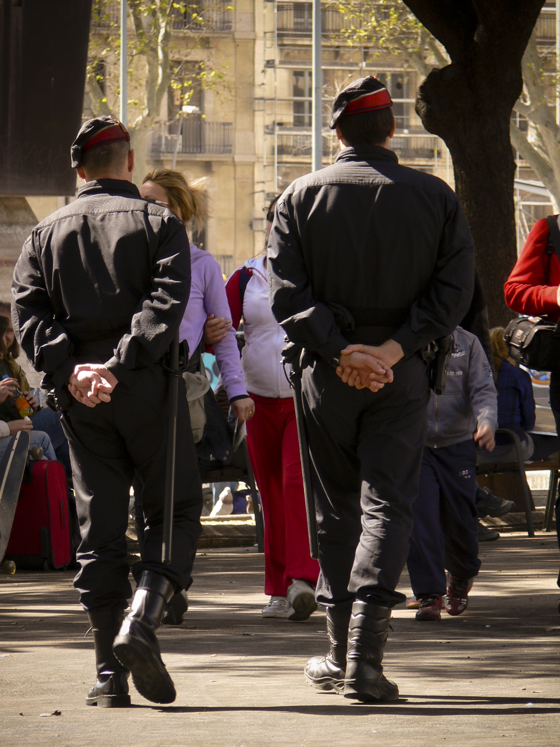 Mossos d'Esquadra a Barcelona. Spring 2008.